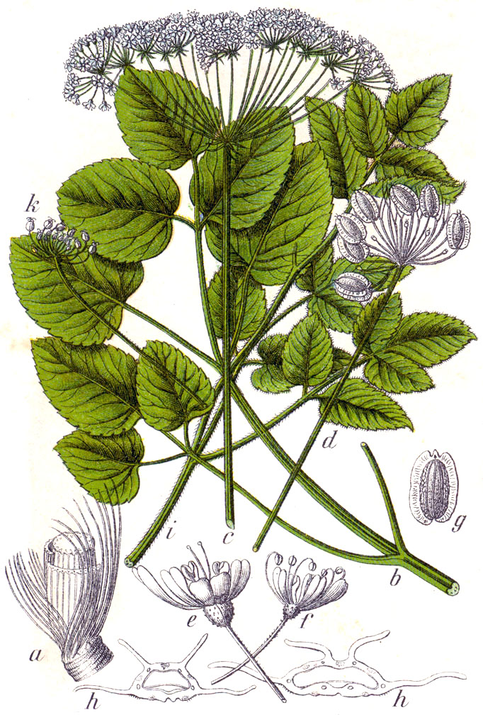 Laserpitium latifolium L. Original Caption Weisse Hirschwurz, Laserpicium latifolium